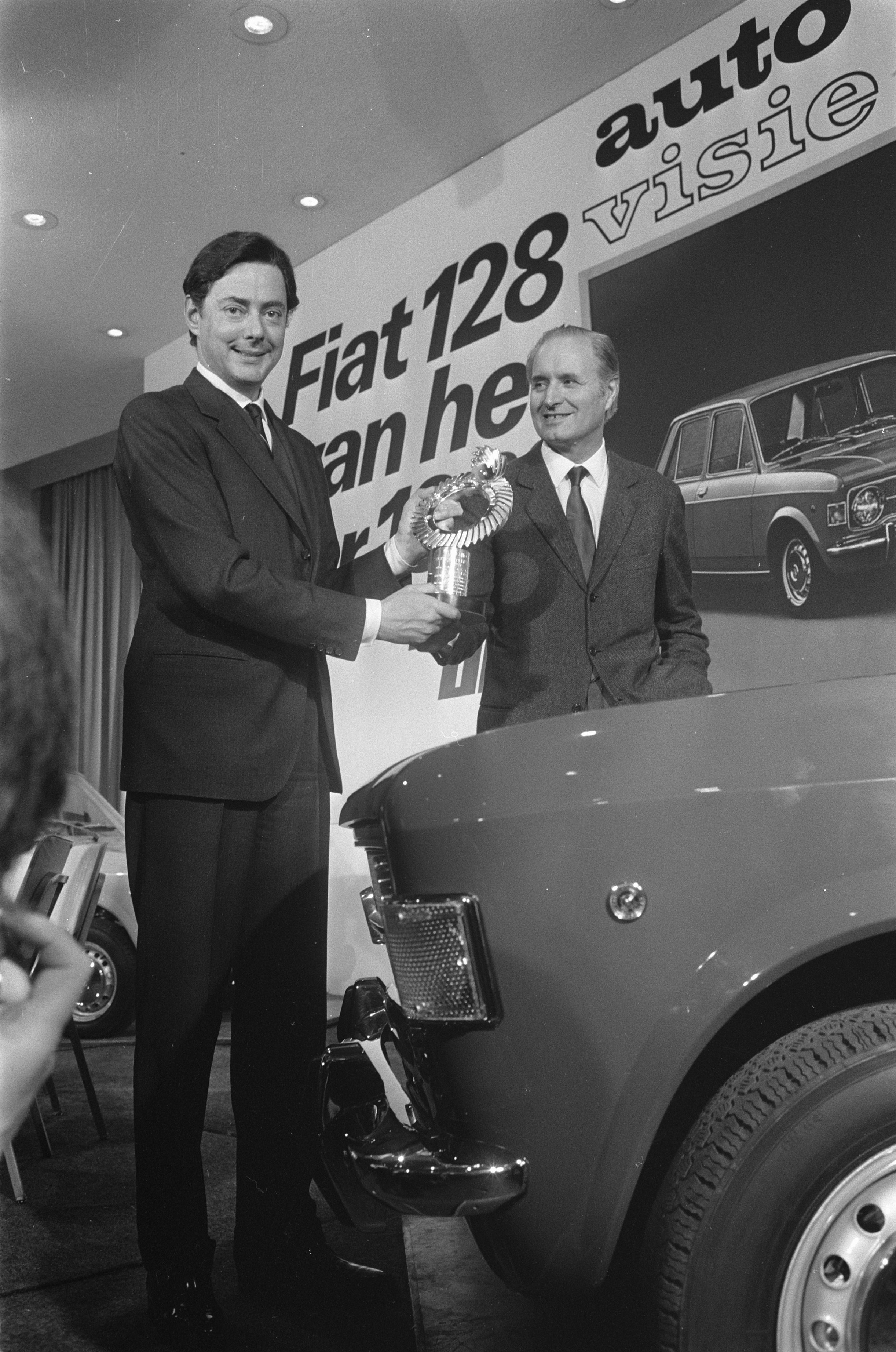 Fiat 128 auto van het jaar. Links dr. Numberto Agnelli en dr. Giacosa, ontwerper 128, ontvangen de trophee in Hilton Amsterdam.